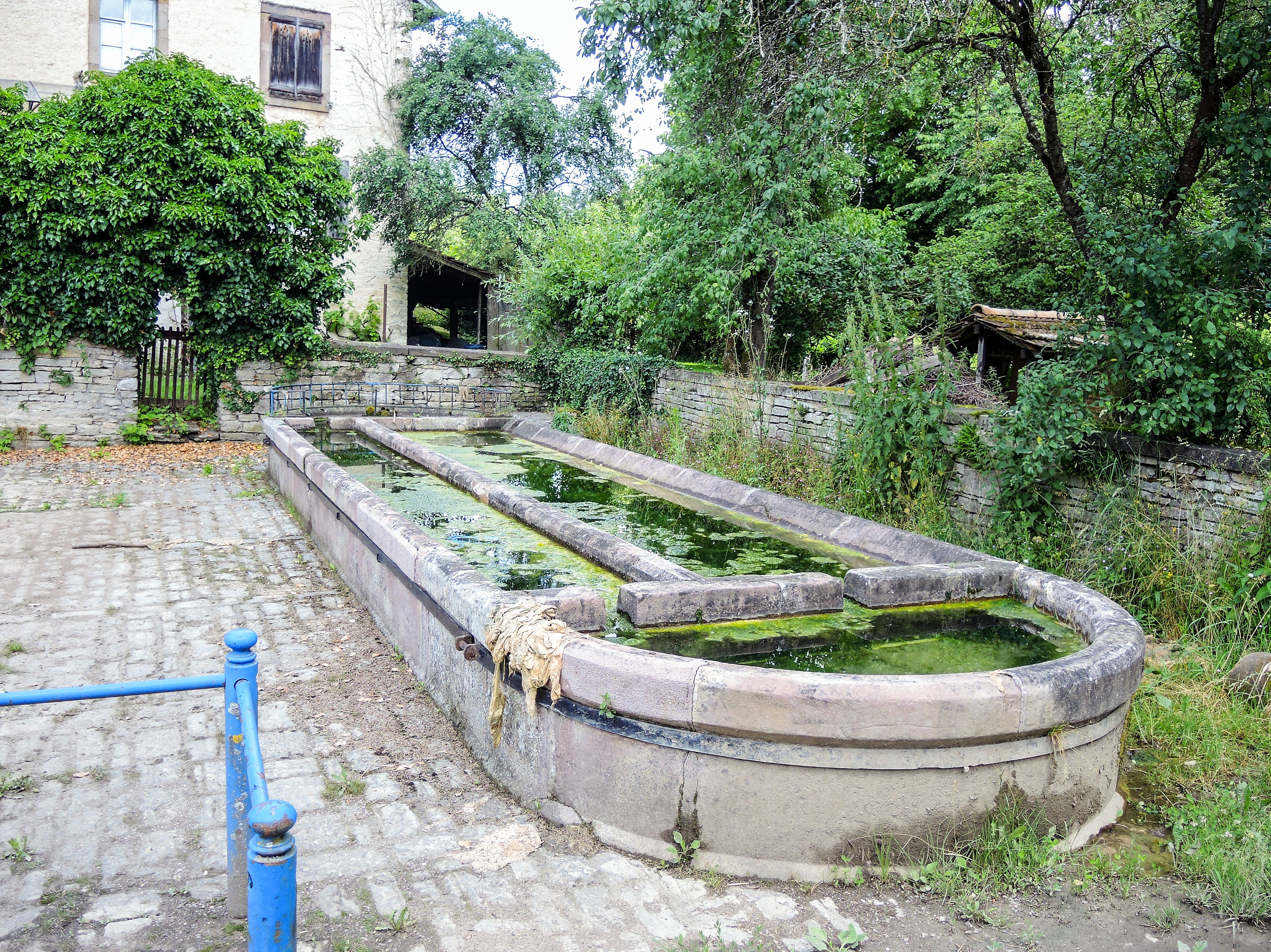 Fontaine-lavoir-abreuvoir, au centre du village d'Issans. Doubs